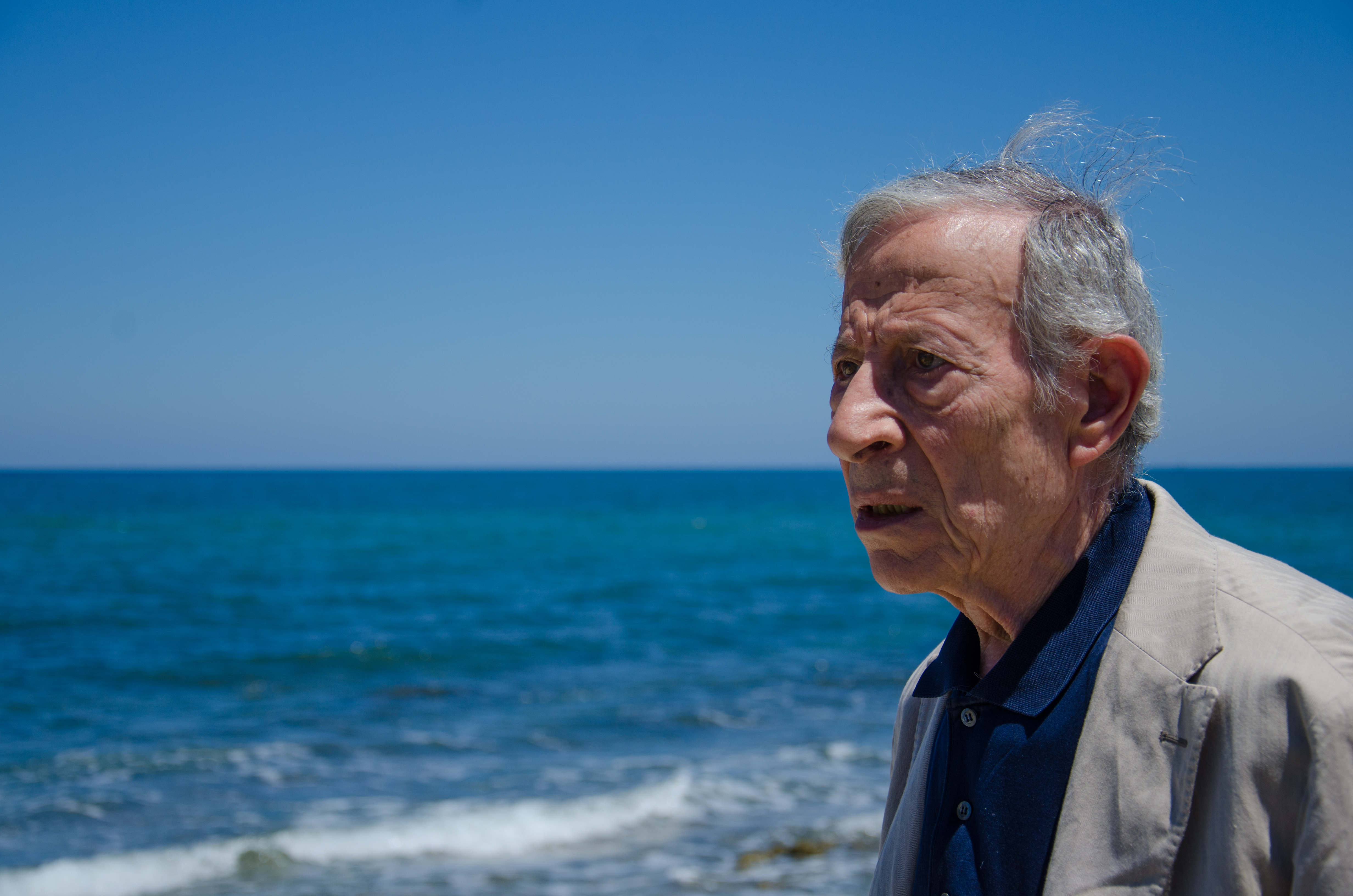 Ettore Toscano sul set del cortometraggio Dentro il mare di Leonardo Dell'Olio